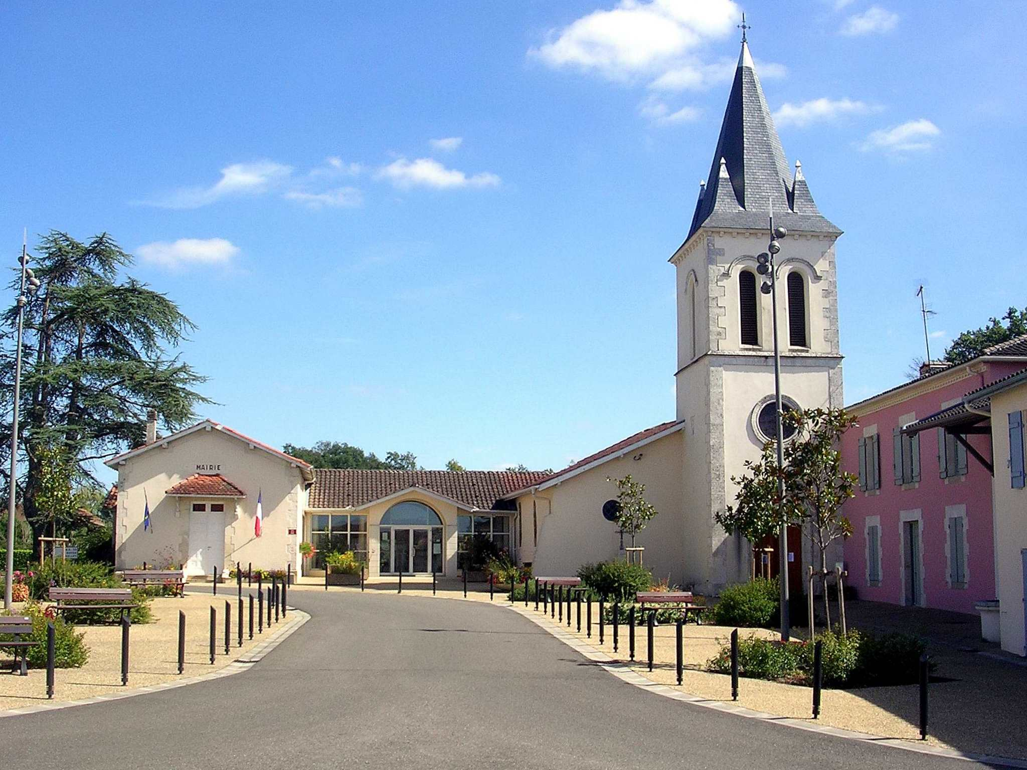 Bretagne-de-Marsan, mairie et église Saint-Martin